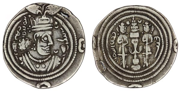 Монети